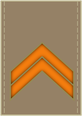 Saudi Arabian military ranks (Corporal).عريف